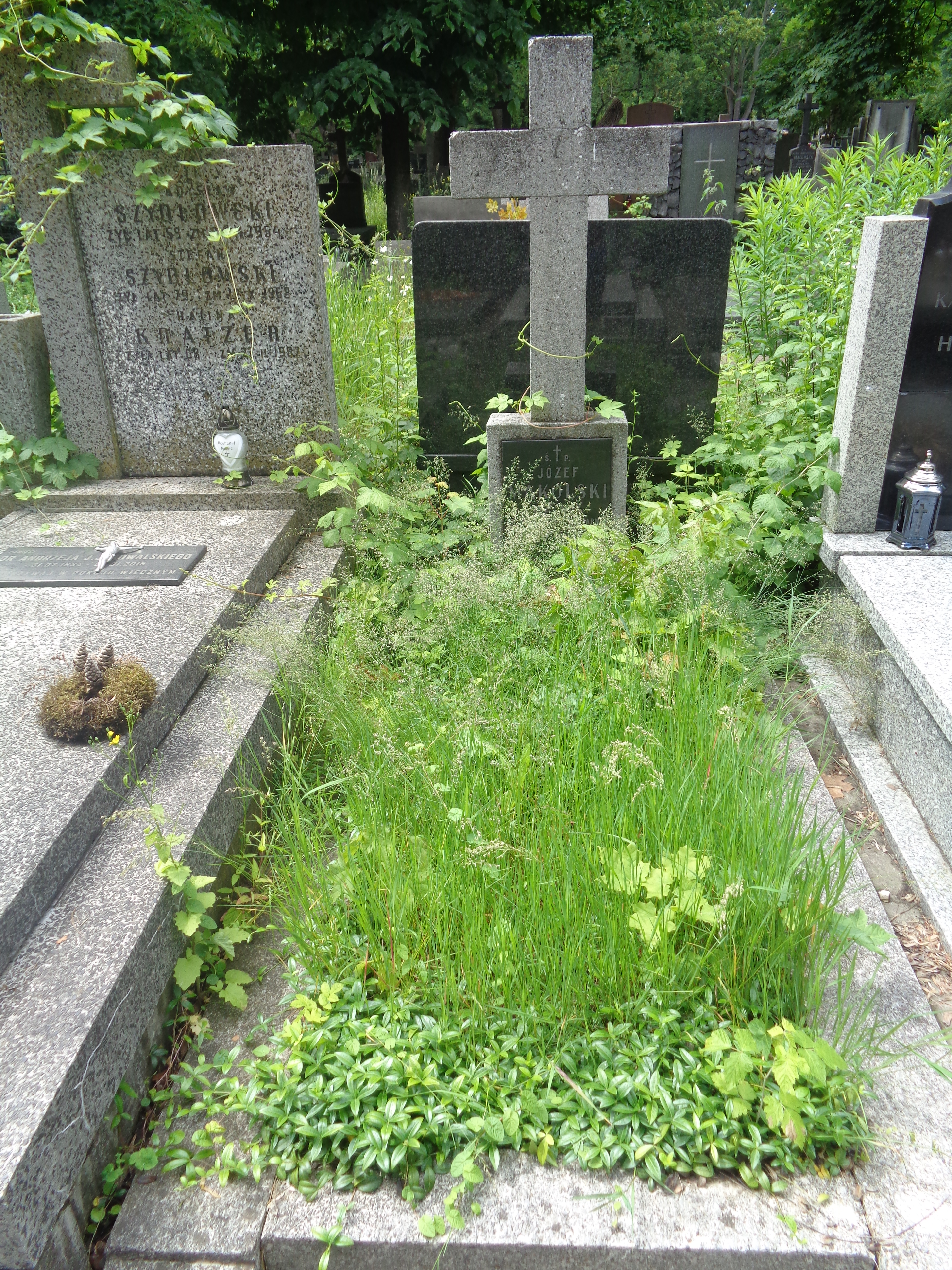 Grób Józefa Makólskiego na Cmentarzu Powązkowskim